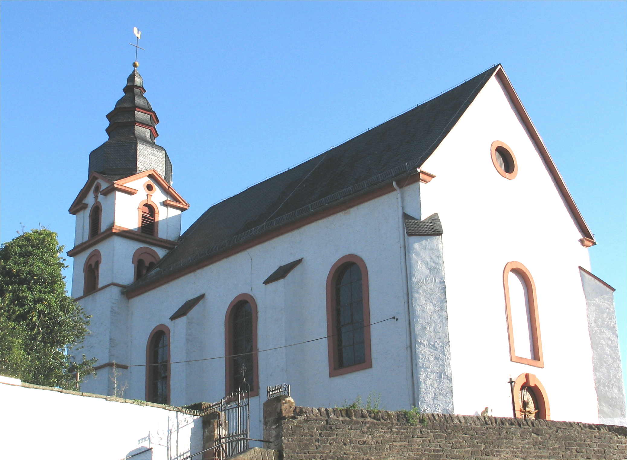 D'Kierch vu Butzweiler